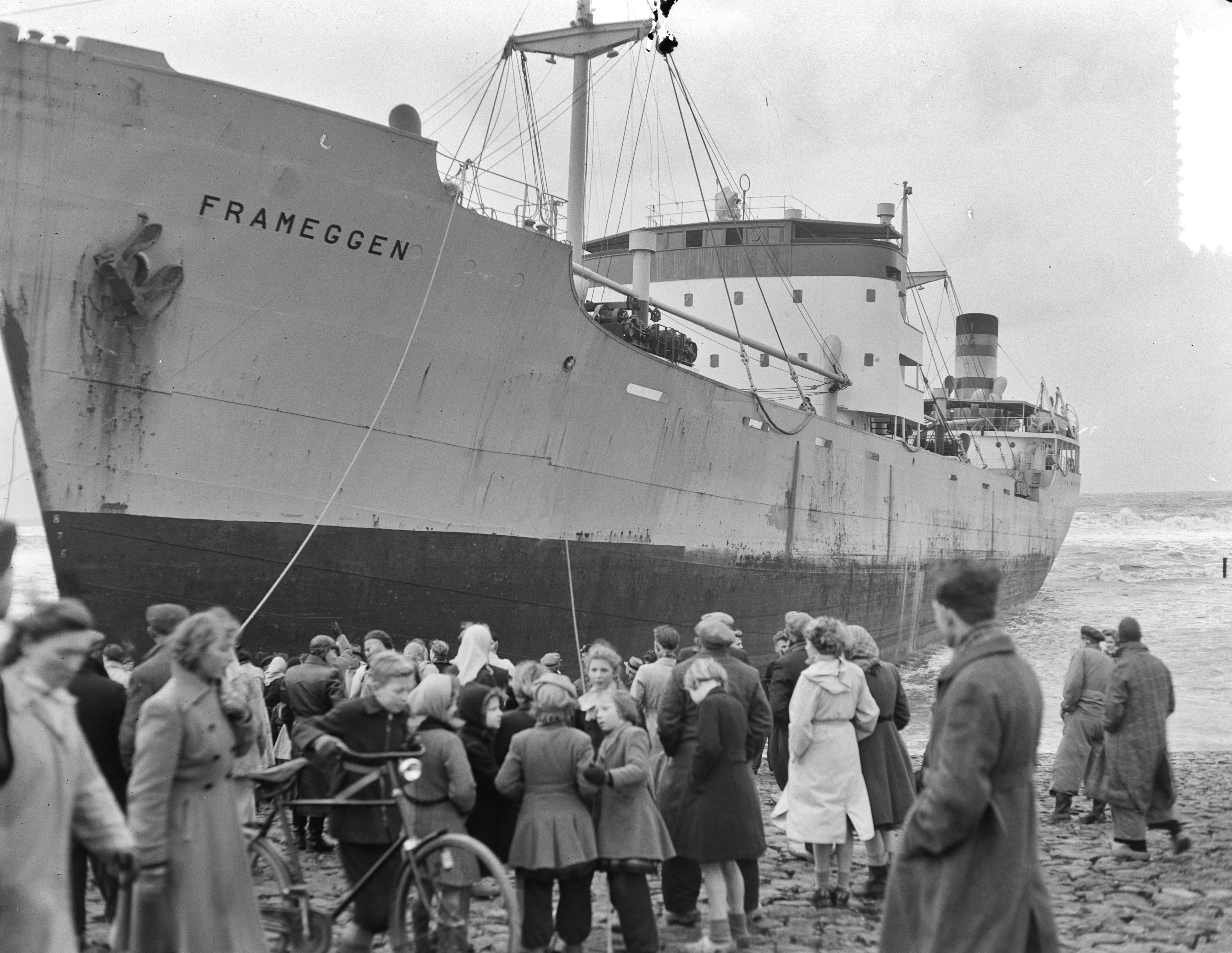 Collectie / Archief : Fotocollectie Anefo Reportage / Serie : [ onbekend ] Beschrijving : Noors schip Ss. Franeggen op Hondsbosche Zeewering Petten Datum : 2 januari 1952 Locatie : Hondsbossche Zeewering, Petten Trefwoorden : schepen Fotograaf : Pot, Harry / Anefo Auteursrechthebbende : Nationaal Archief Materiaalsoort : Negatief (zwart/wit) Nummer archiefinventaris : bekijk toegang 2.24.01.04 Bestanddeelnummer : 904-9072